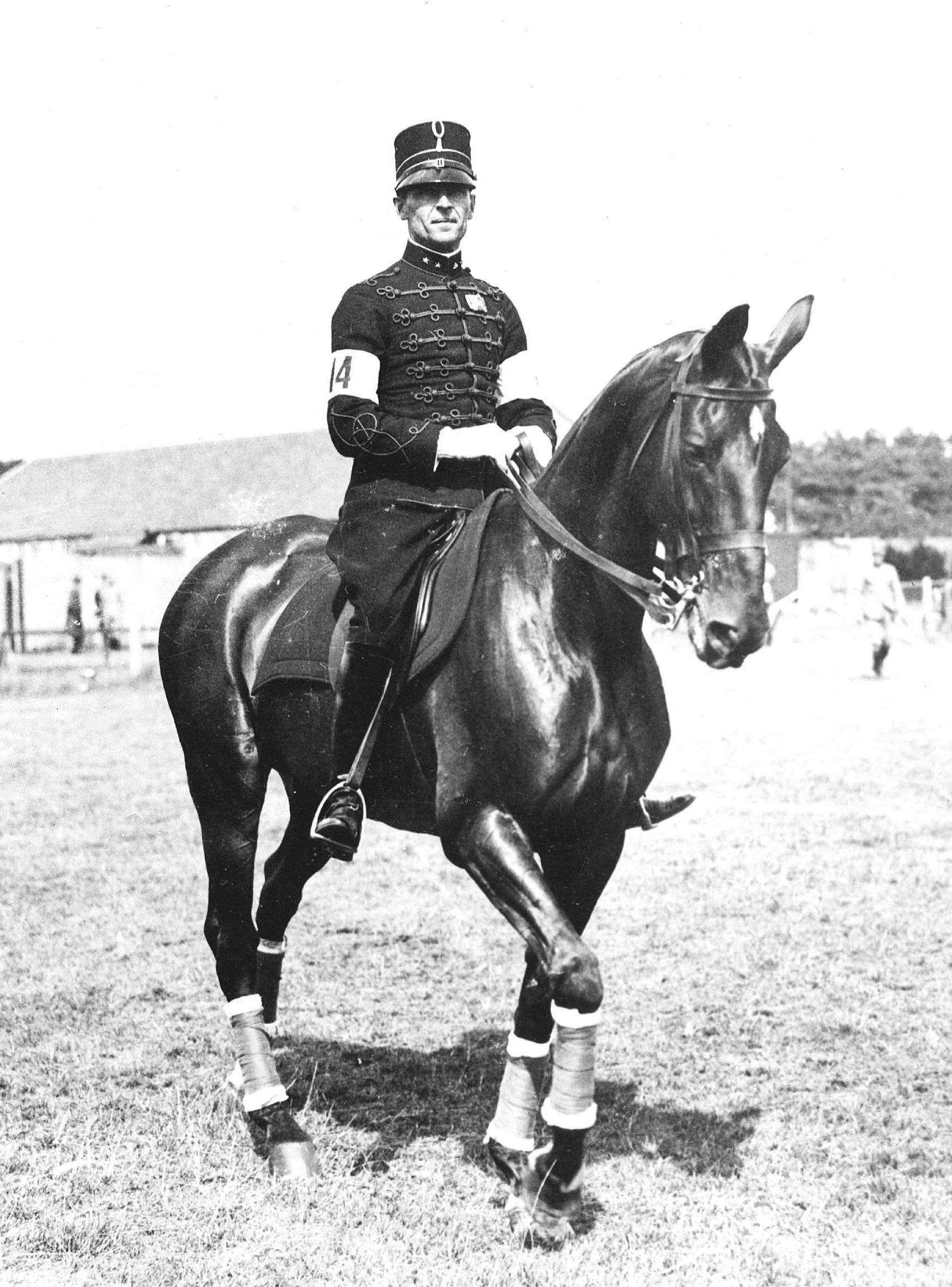 Olympische spelen 1928 in Amsterdam. Gouden medaille voor de Nederlandse militaire equipe die bestaat uit Pahud de Mortanges, de Kruyff en van der Voort van Zijp. Op de foto: Luitenant Dolf van der Voort van Zijp op zijn paard 'Silver Piece'. Amsterdam 1928. (Van der Voort van Zijp won ook tijdens de O.S. 1924 in Parijs goud individueel op het onderdeel military).